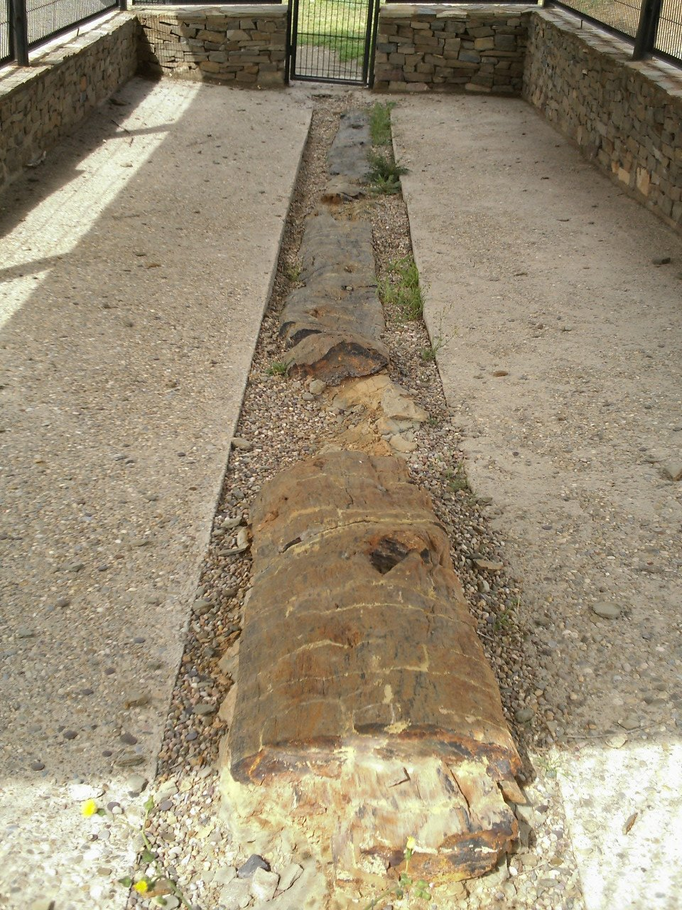 Arbol fosilizado en La Rioja baja, España